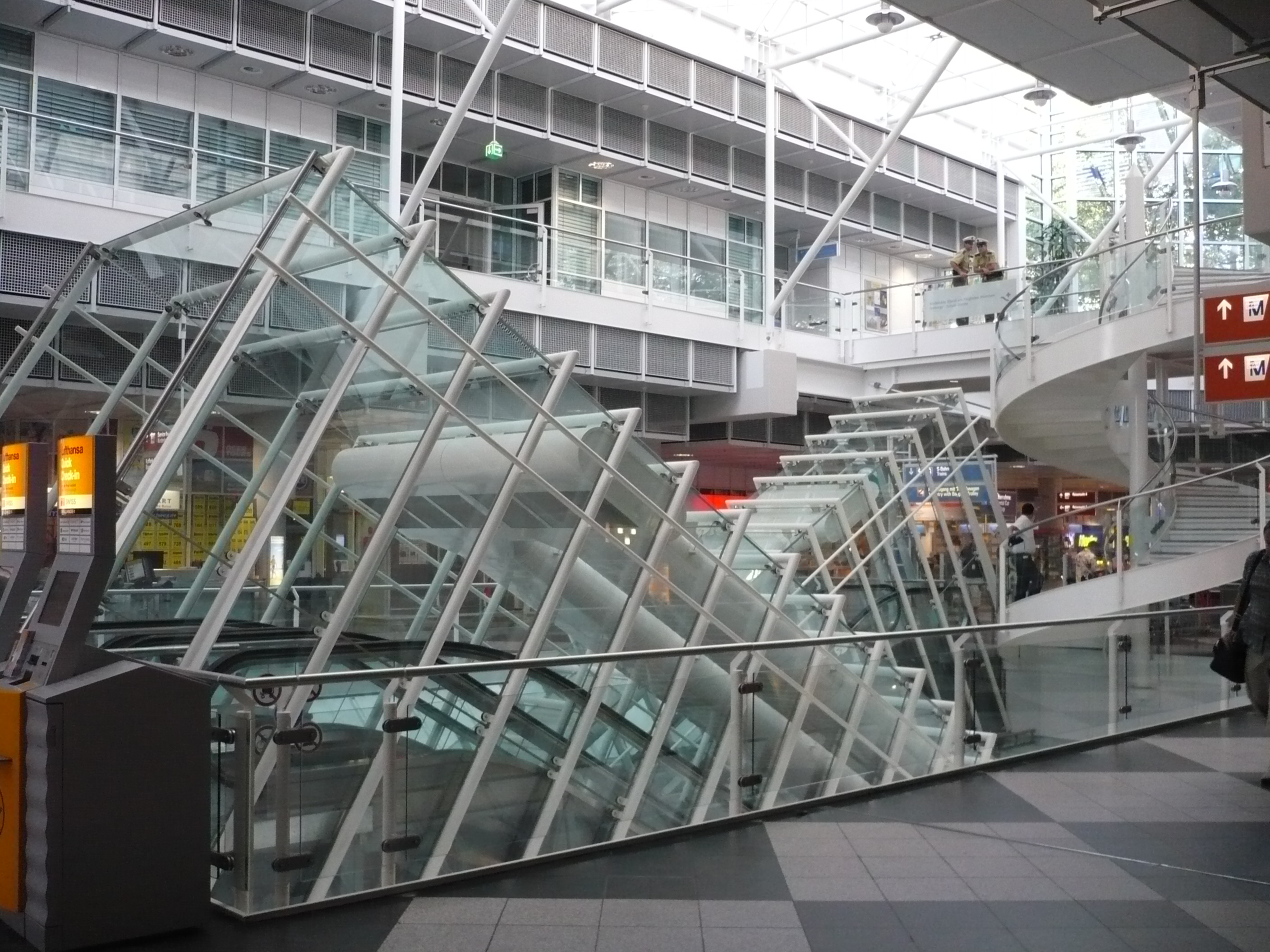 Rolltreppen zum S-Bahnhof im Zentralbereich des Flughafen Münchens